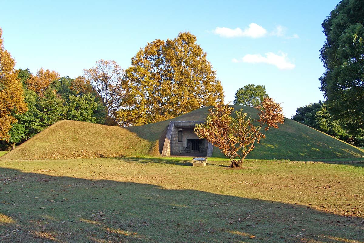 鶴見古墳（川部・高森古墳群）。大分県宇佐市。墳丘の北西方向より撮影。